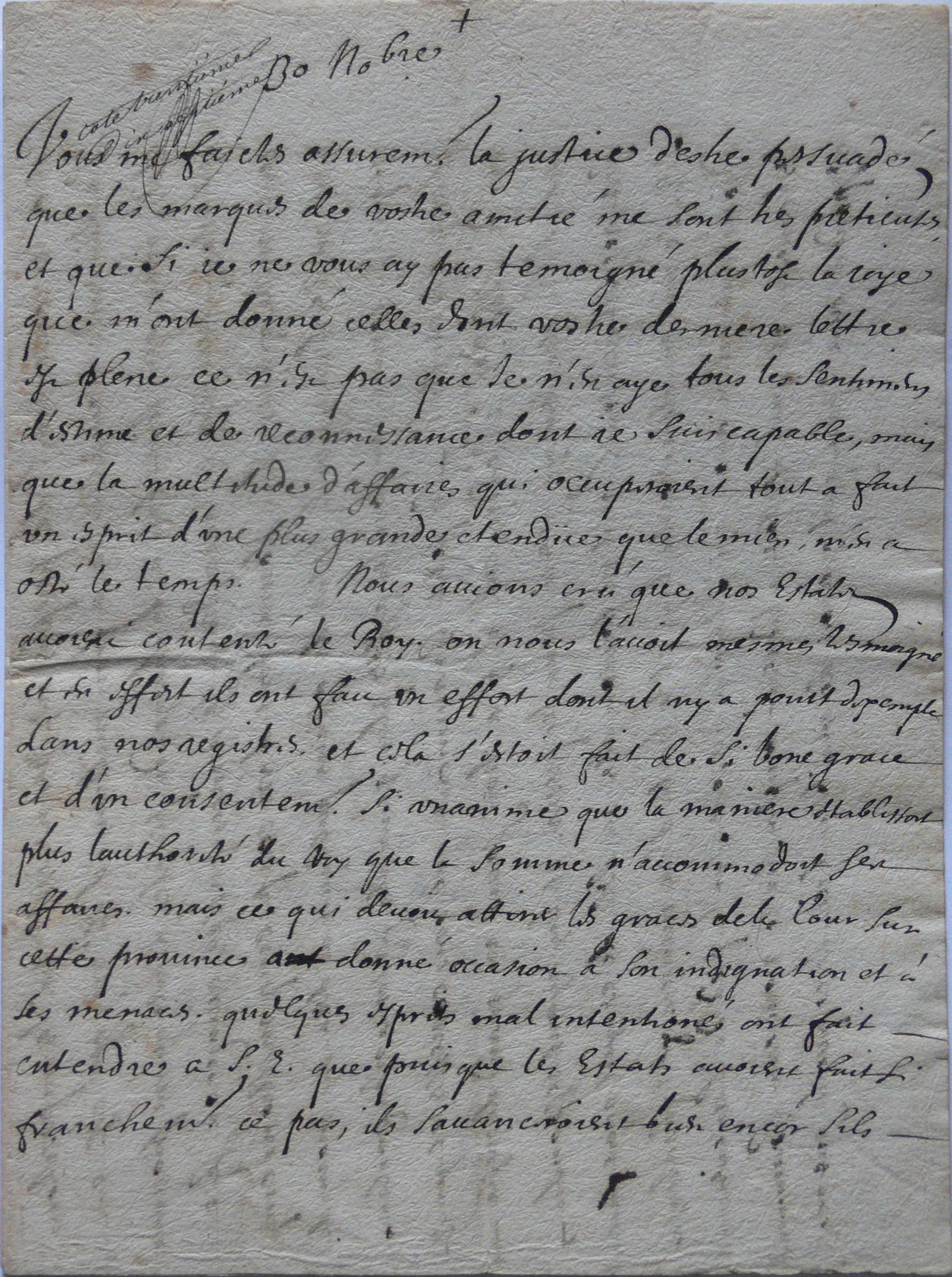 Lettre de Gilbert de Choiseul eveque de Comminges à Simon Arnauld de Pomponne, 30 novembre 1659, 5 p. et quart, coll. particulière. Une édition en est donnée dans Rémi Mathis, « Politique, jansénisme et sociabilité dans le Comminges du Grand Siècle. L’amitié entre Gilbert de Choiseul, évêque de Comminges, et Simon Arnauld de Pomponne (1659-1662) » dans Revue de Comminges et des Pyrénées centrales, 2011-2, p. 331-358.